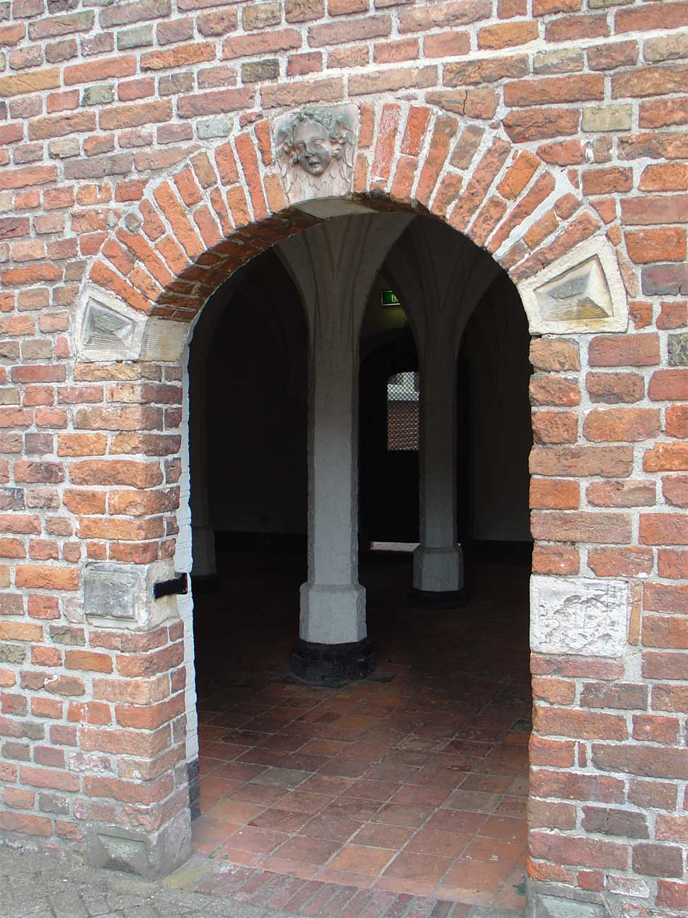 Ingang Roode Weeshuis in Groningen